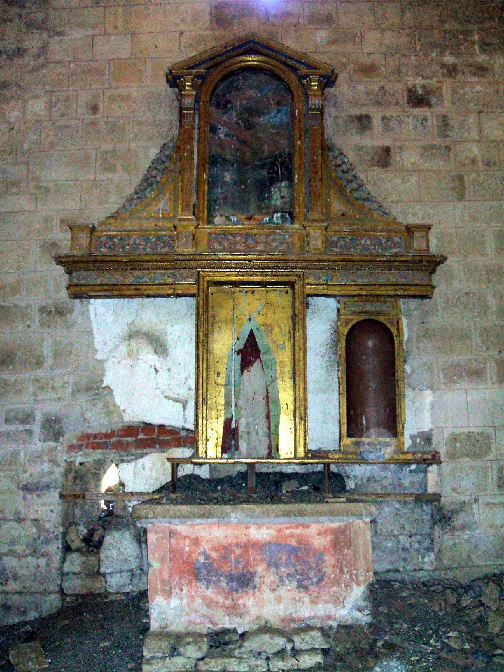 Retablo mutilado de la iglesia del antigo monasterio premonstratense de Santa Cruz de Ribas (Palencia, España)